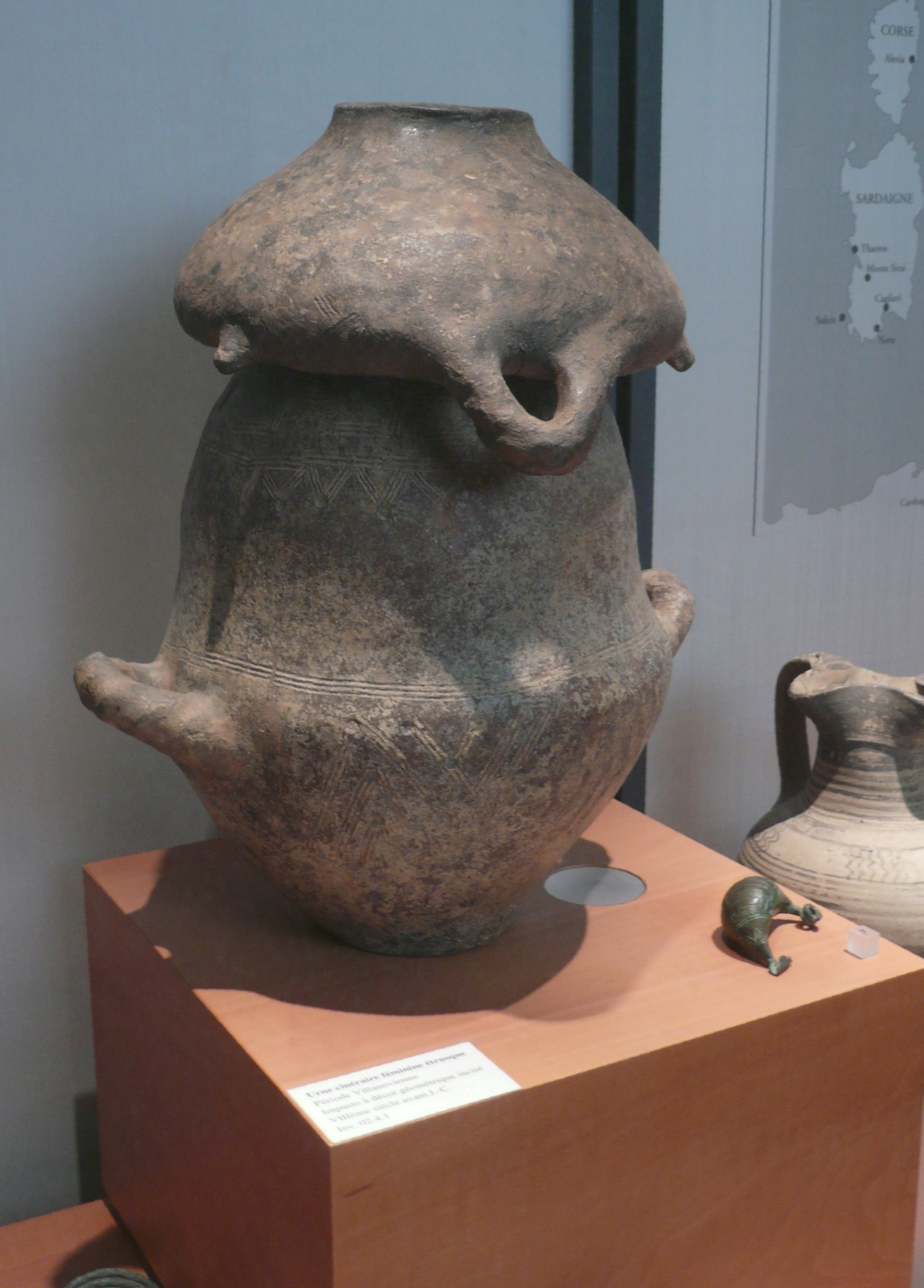 Étrurie, urne cinéraire d'une femme, décor géomètrique incisé, VIIIe siècle av J.C., antiquités classiques du musée d’archéologie méditerranéenne de la vieille charité à Marseille